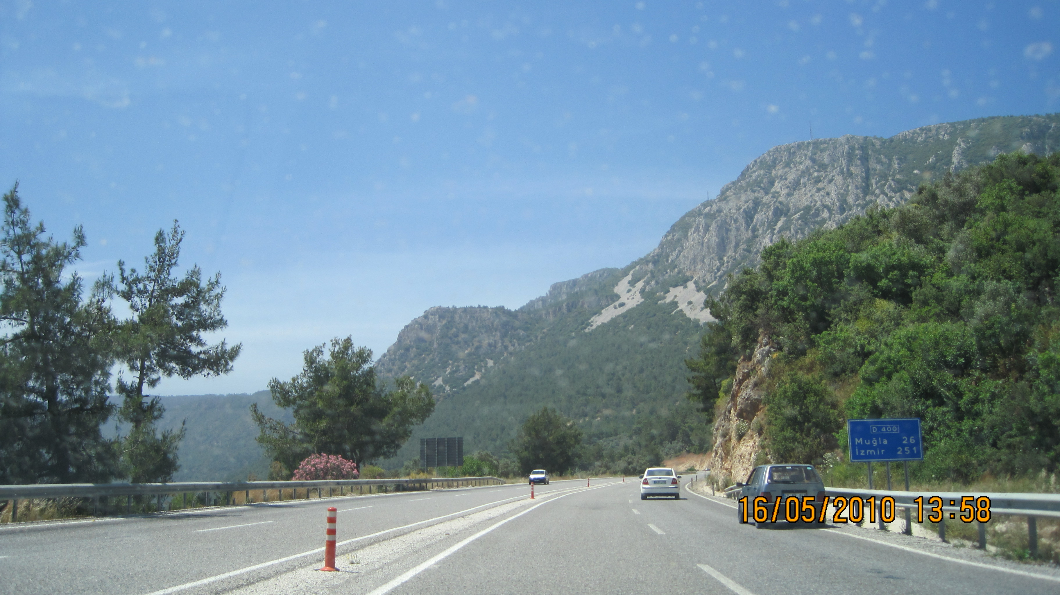 Gökova Belediyesi, 48660 Gökova/Ula/Muğla Province, Turkey